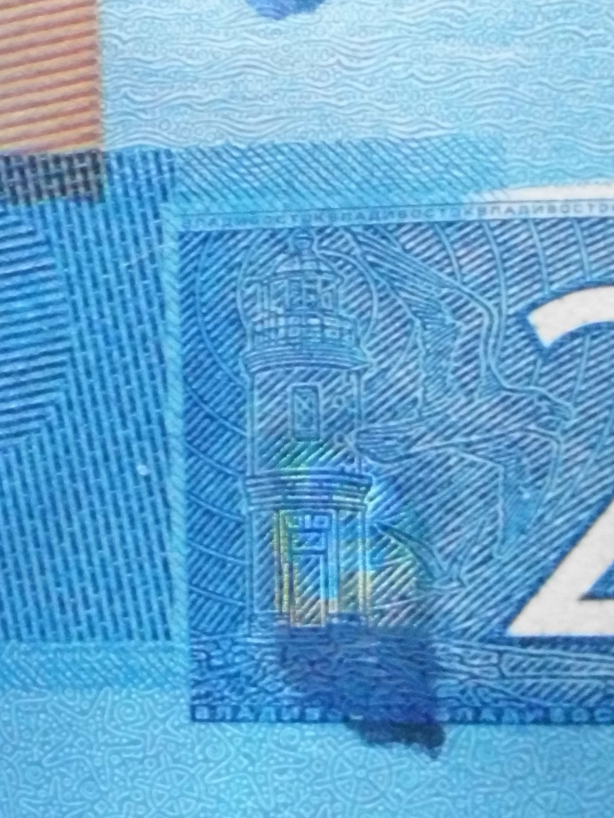 2000 российских рублей образца 2017 года. Аверс. Скрытое изображение. Маяк и чайки (буревестники, альбатросы?) слева внизу на банкноте.